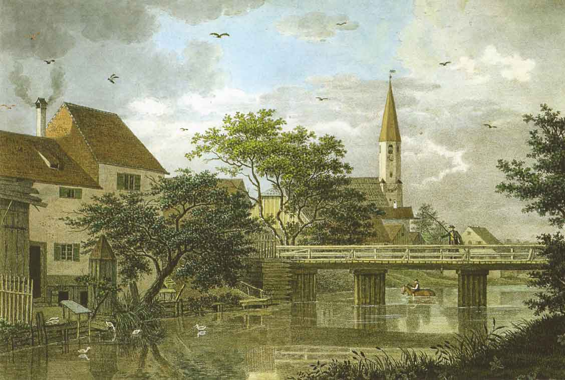 Bachschneiders Bocksleitnerhaus am Schwabinger Bach